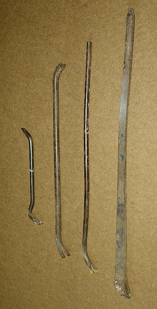 Sõrgkangid